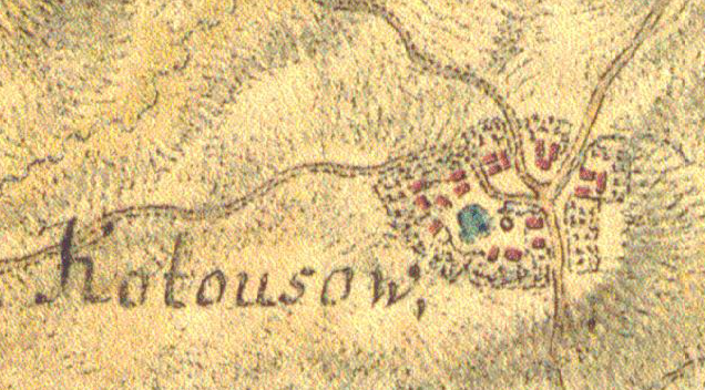 mapa 1750